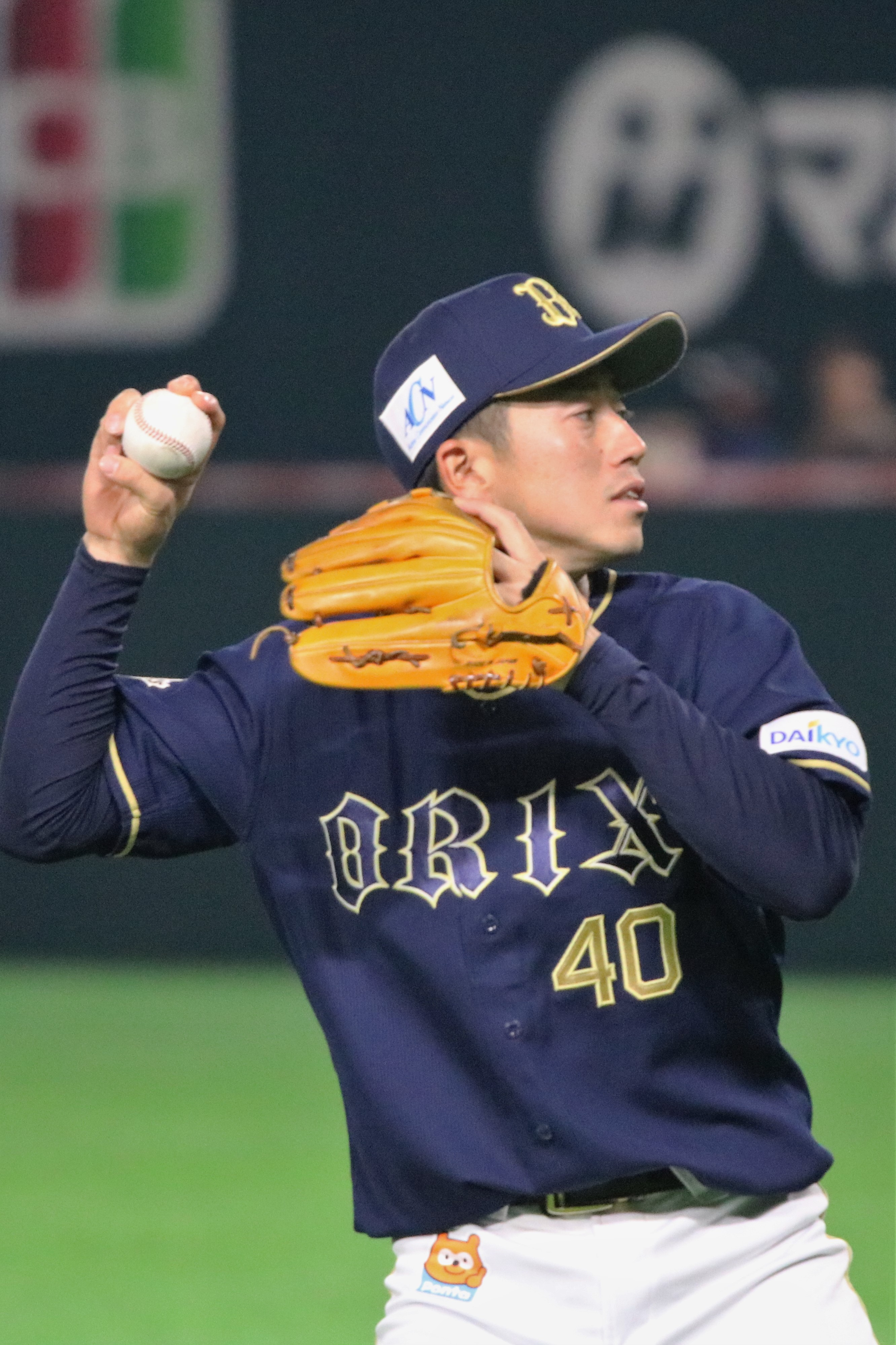 2018年3月31日 福岡ヤフオクドーム